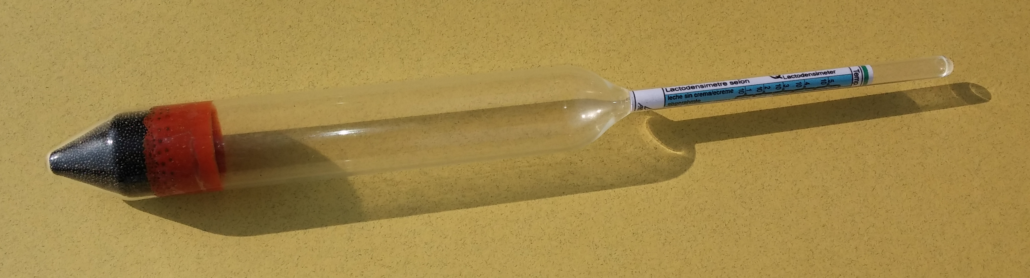 Lactodensimeter. Gerät zur Messung des Fettgehalts der Milch.